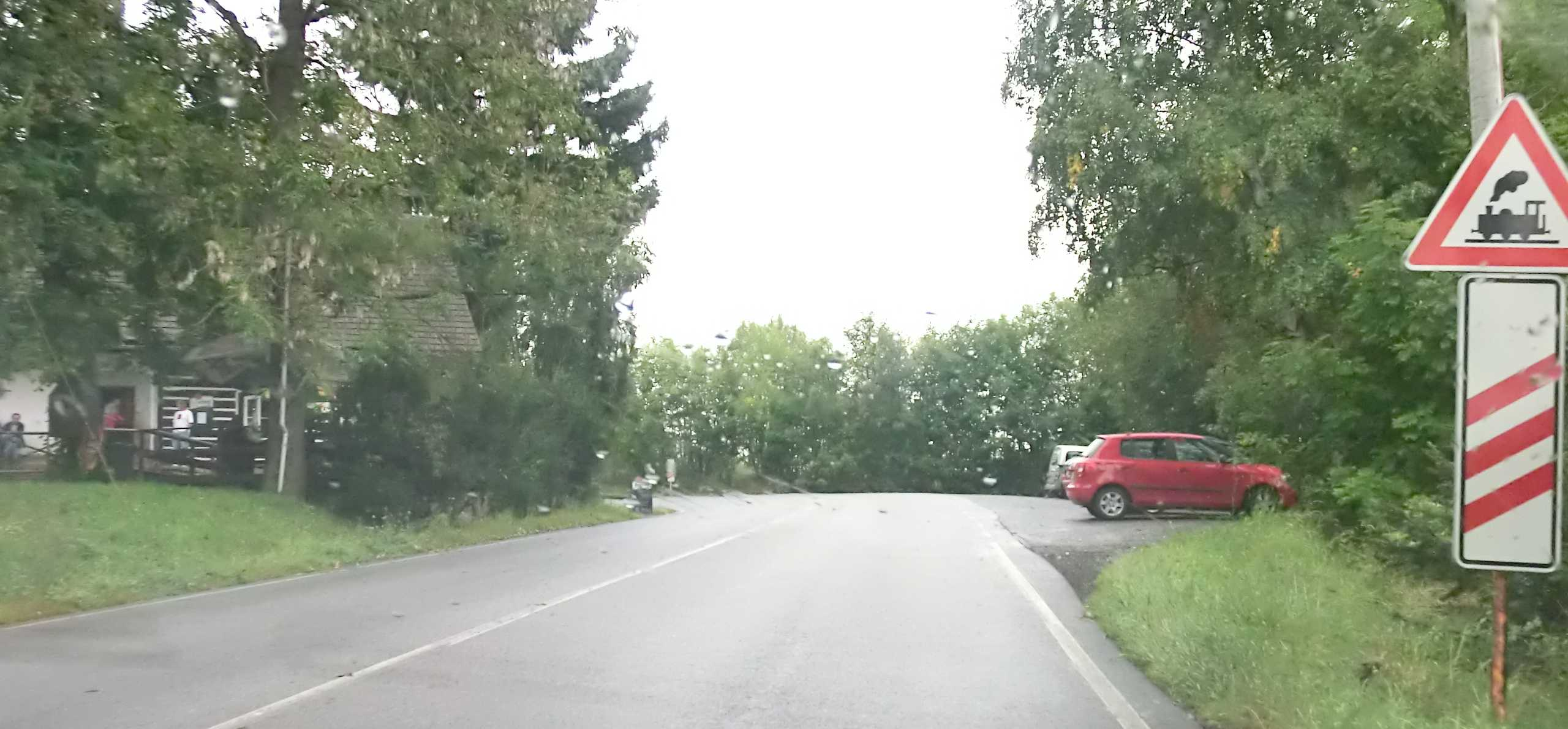 Ploužnice - výjezd z jedné a vjezd do druhé zatáčky před železničním přejezdem. Lahůdka pro šoféry.